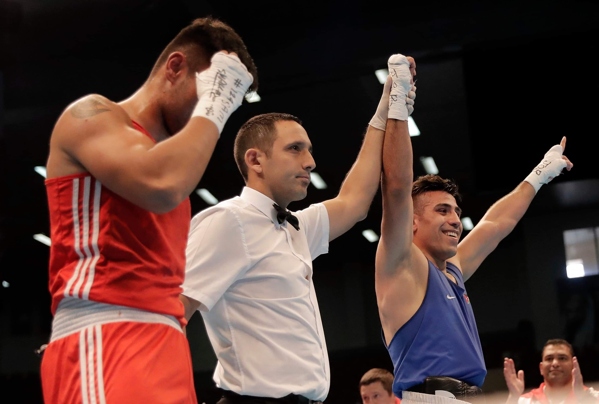 لاعب المنتخب الأردني ، حسين عشيش ، المتأهل إلى أولمبياد طوكيو 2020